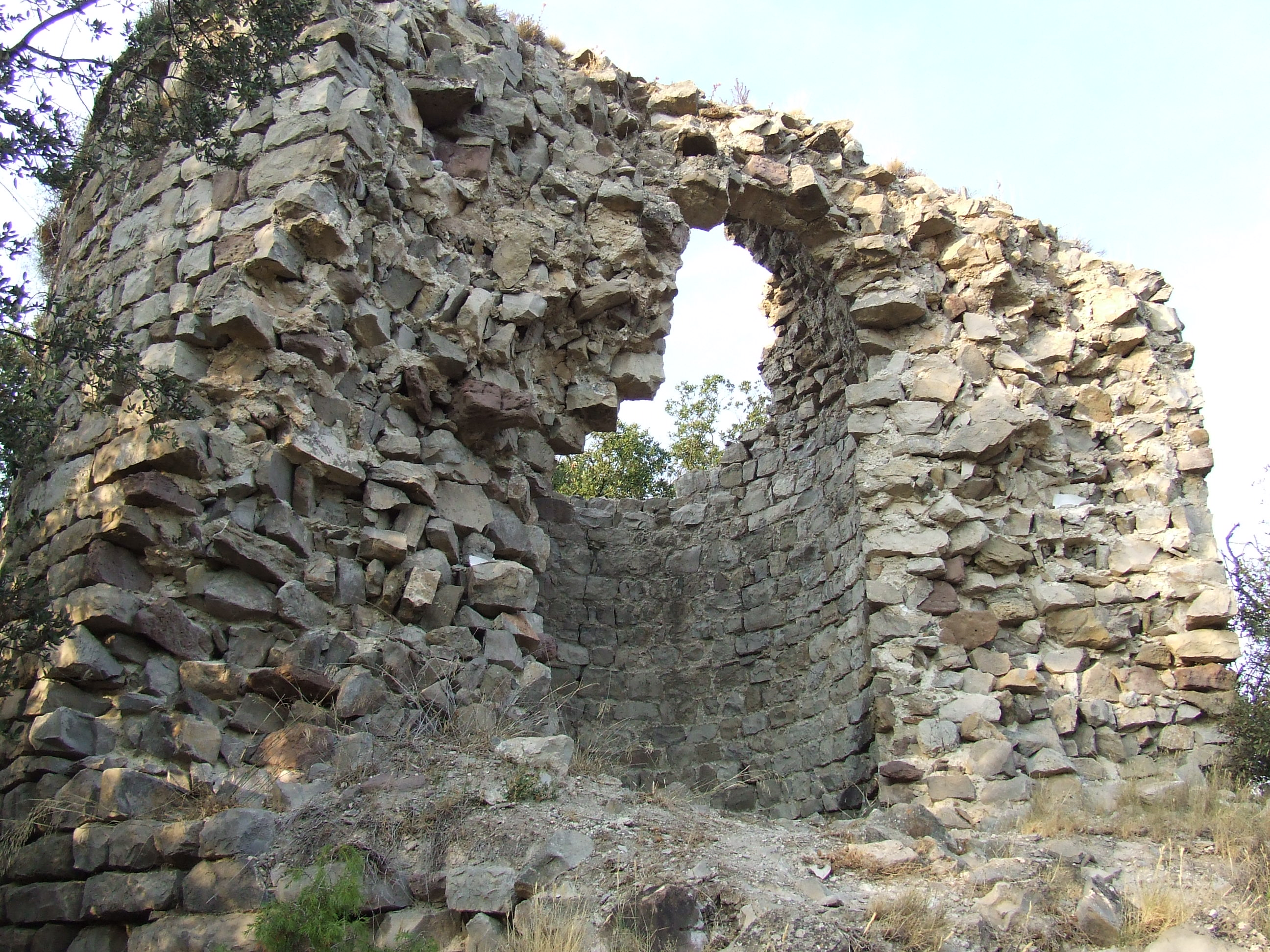 Castell de Clarà (Moià, Moianès)